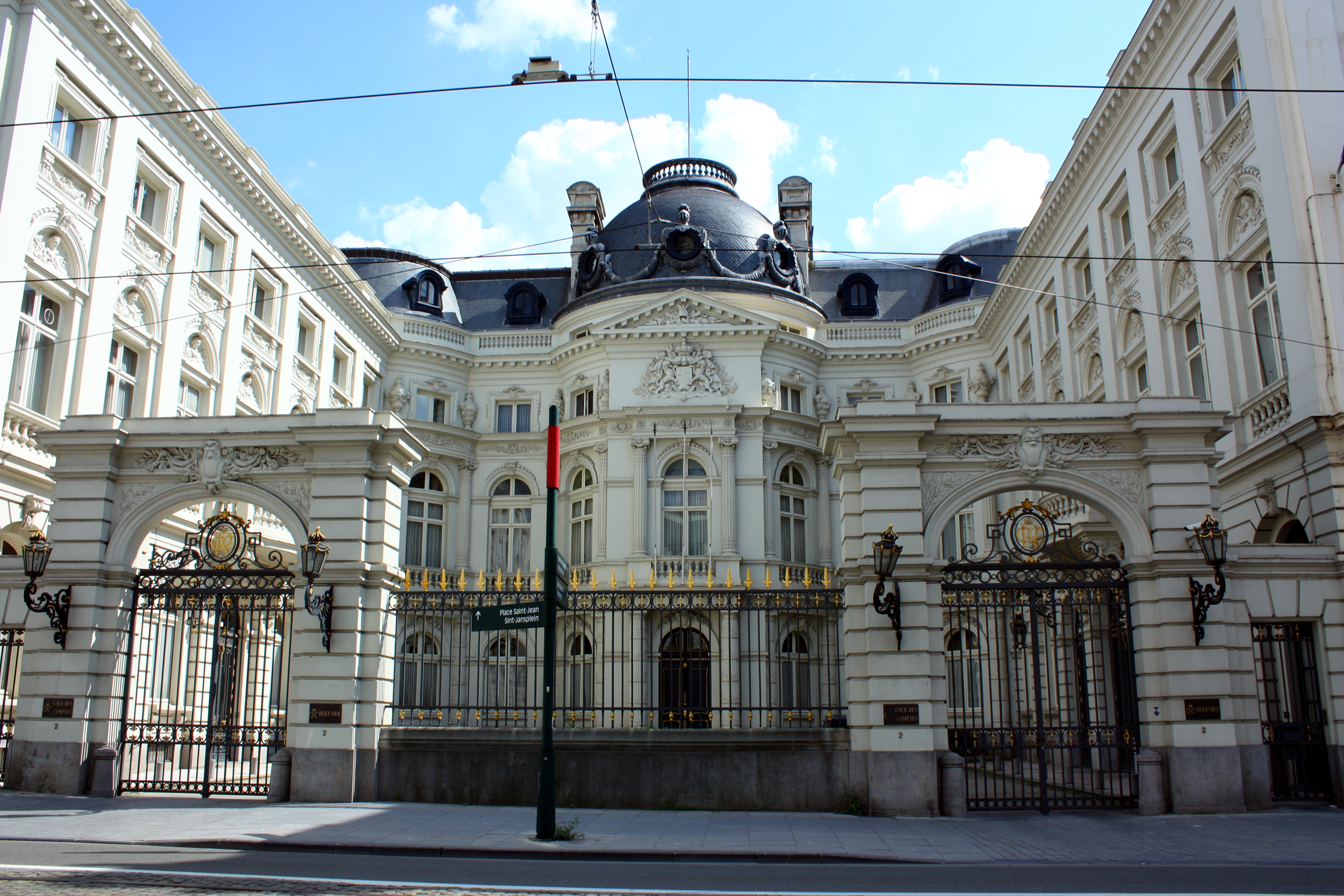 Palais du Comte de Flandre, aujourd'hui siège de la Cour des comptes. Construit en 1776-1781 par Barnabé Guimard. (Style: Classicisme) Monument classé n°2043-0566/0